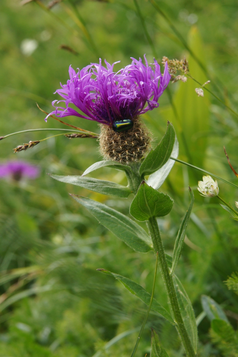 Peresasti glavinec na Lazovškem prevalu.